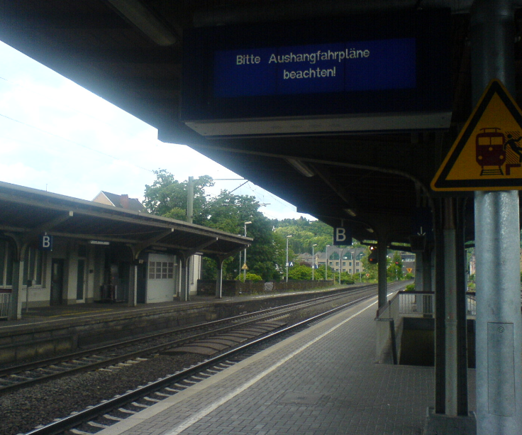 Gleis 2 - LCD-Zugzielanzeiger